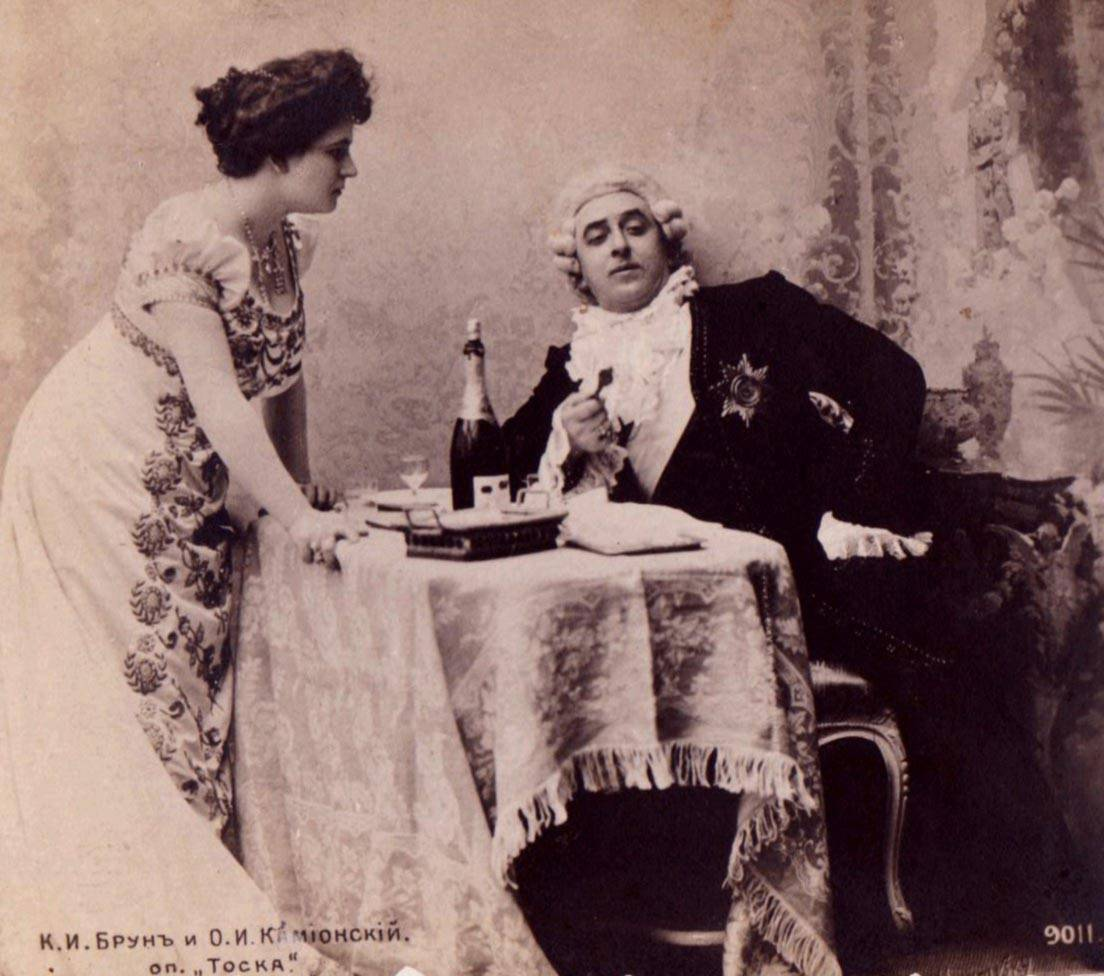 К. І. Брун і О. І. Камионський — Тоска і Скарпіа (опера "Тоска" Дж. Пуччіні)